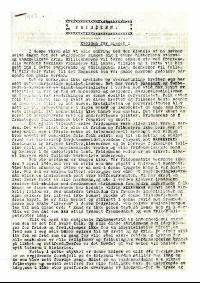 Forsiden til Friheten nr. 1 1942 (nr. 10-20 fra 1941)